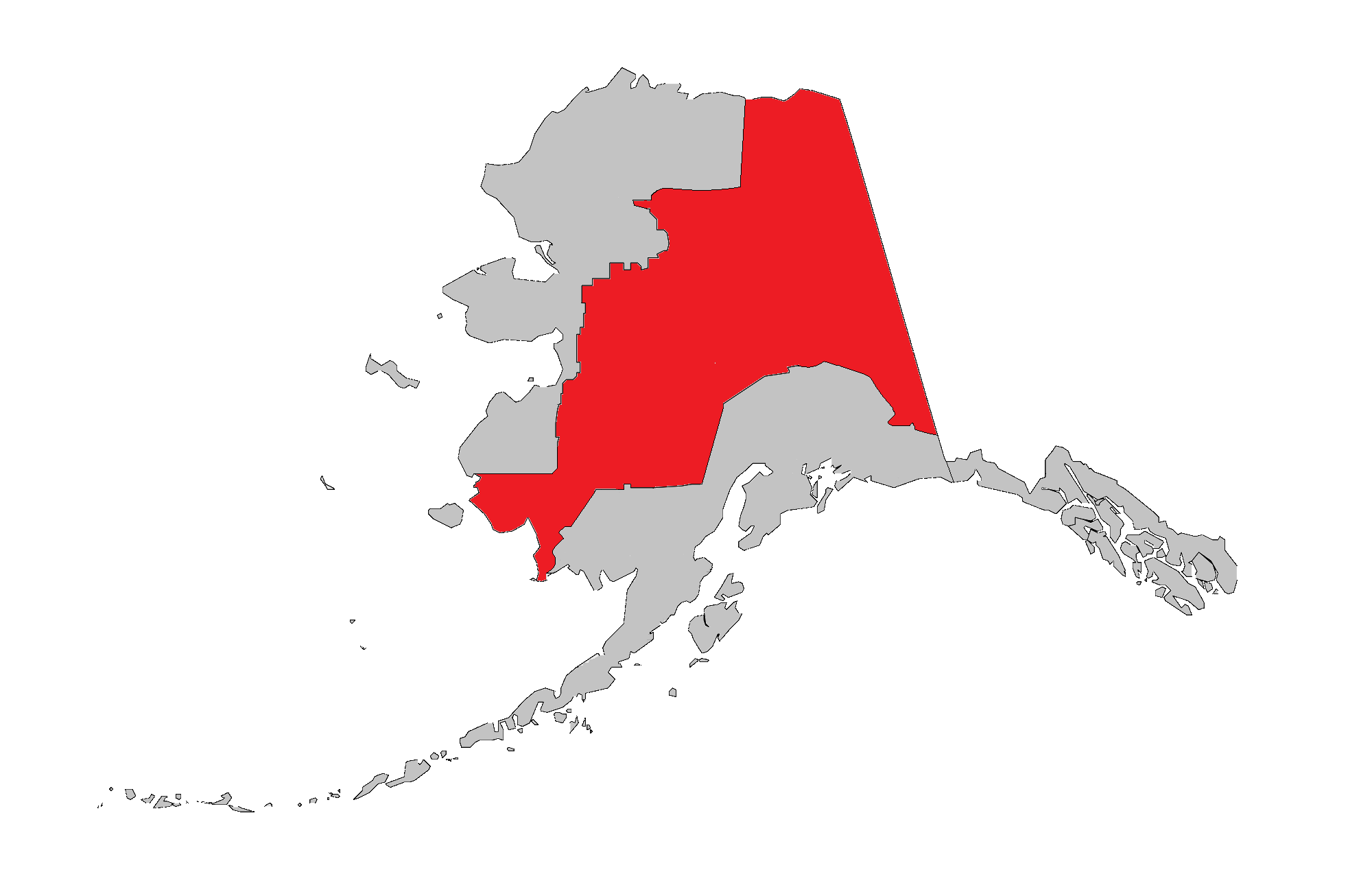 A map of the Fourth Judicial District (also refered to as Division #4) in red. Based on "Map of boroughs and census areas" av cmrivers.